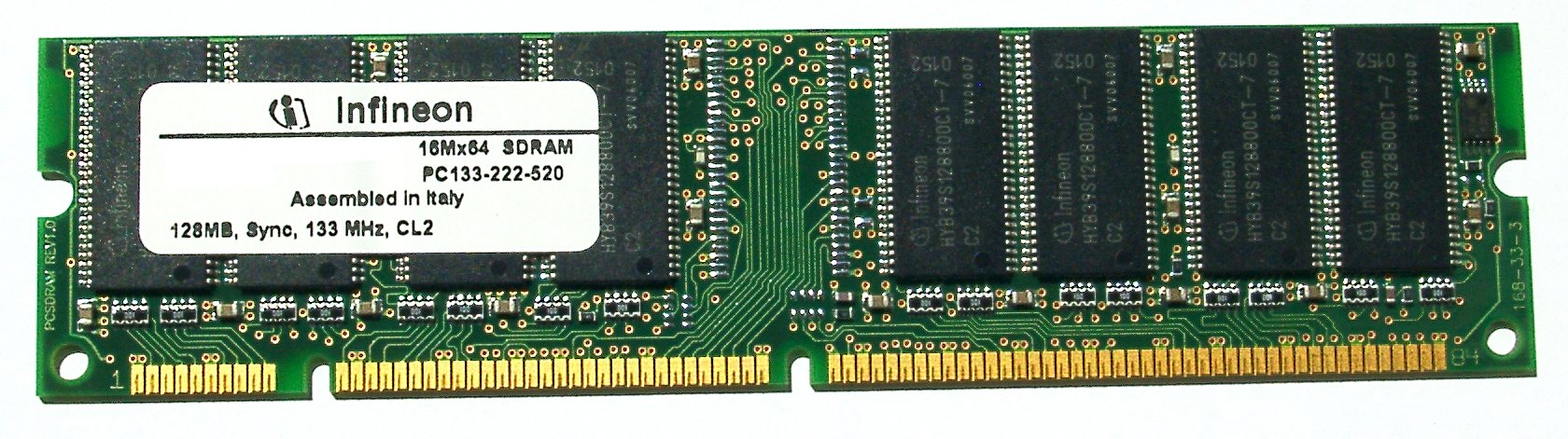 SDRAM-Modul